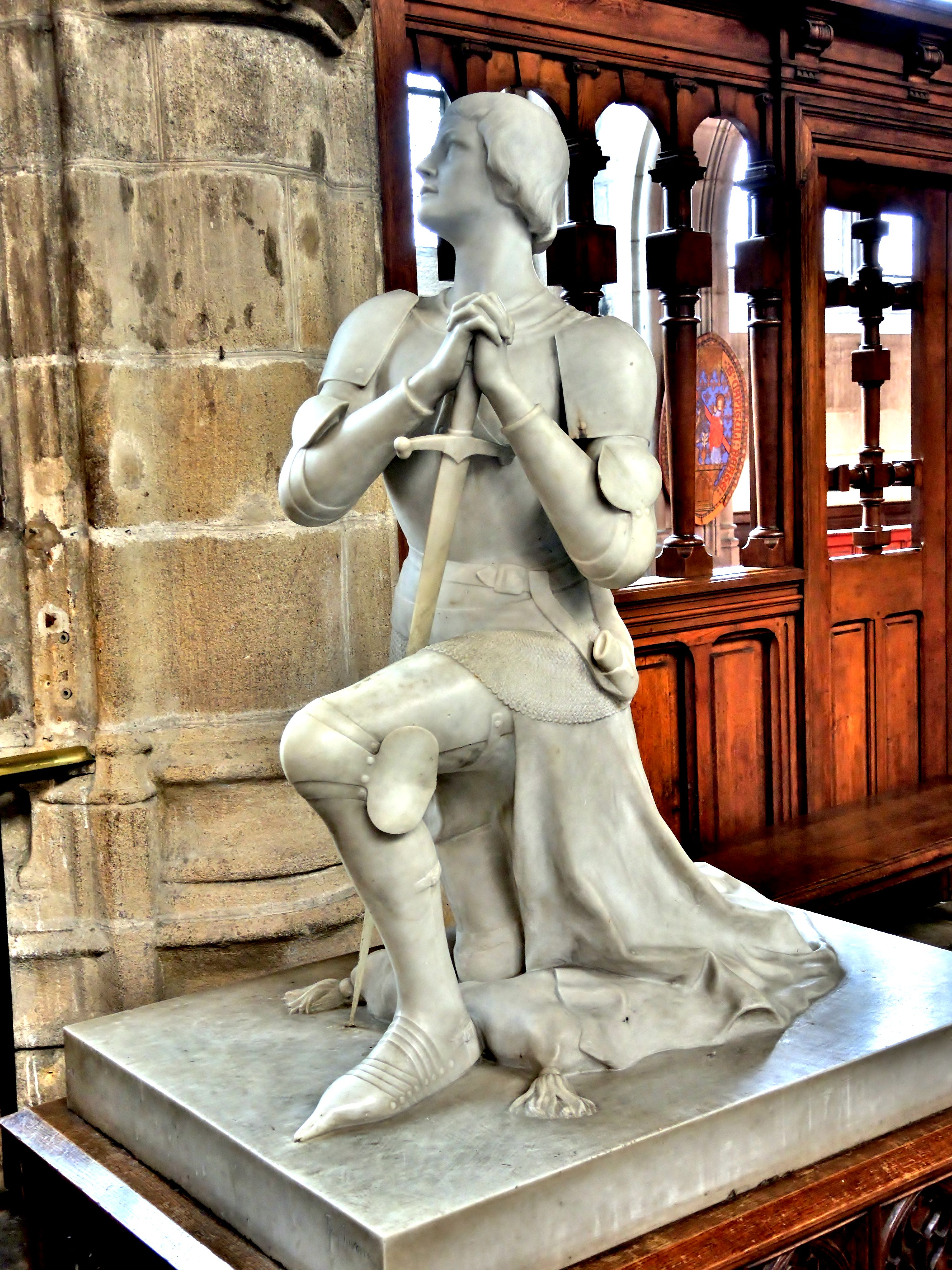 Statue de Jeanne d'Arc, dans la cathédrale de Moulins. Allier